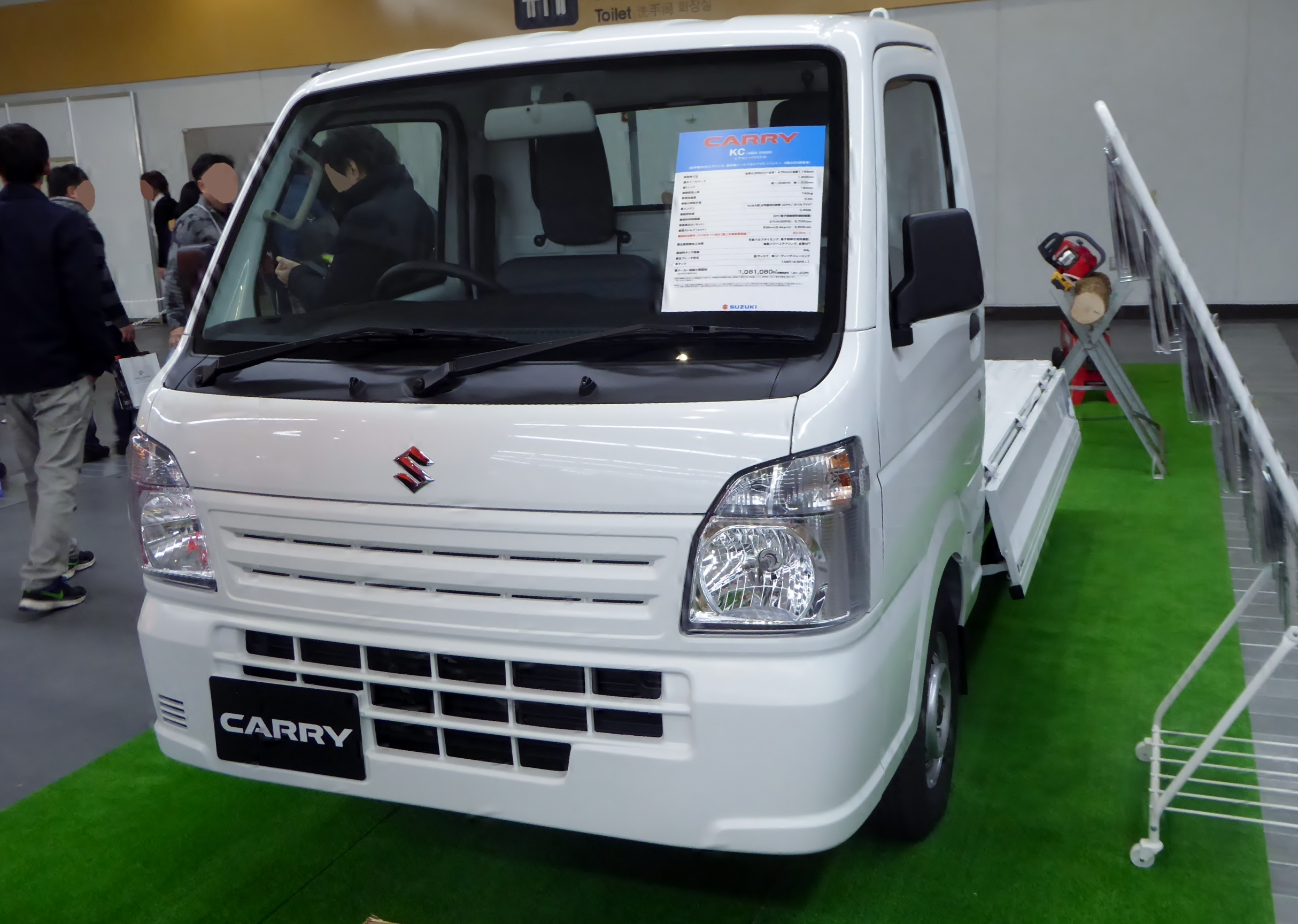 大阪オートメッセ2016においてEBD-DA16T型スズキ・キャリイKCを撮影。